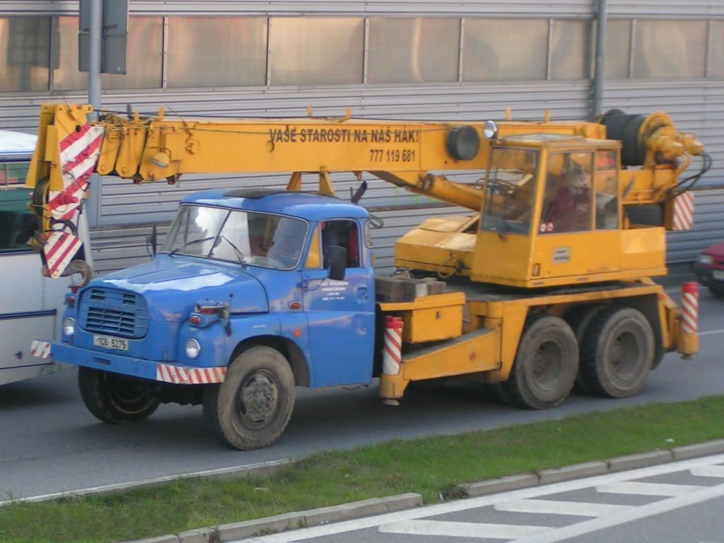 Tatra T 148 mit ČKD-Kran